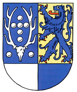 Wappen des ehemaligen Kreises Uslar